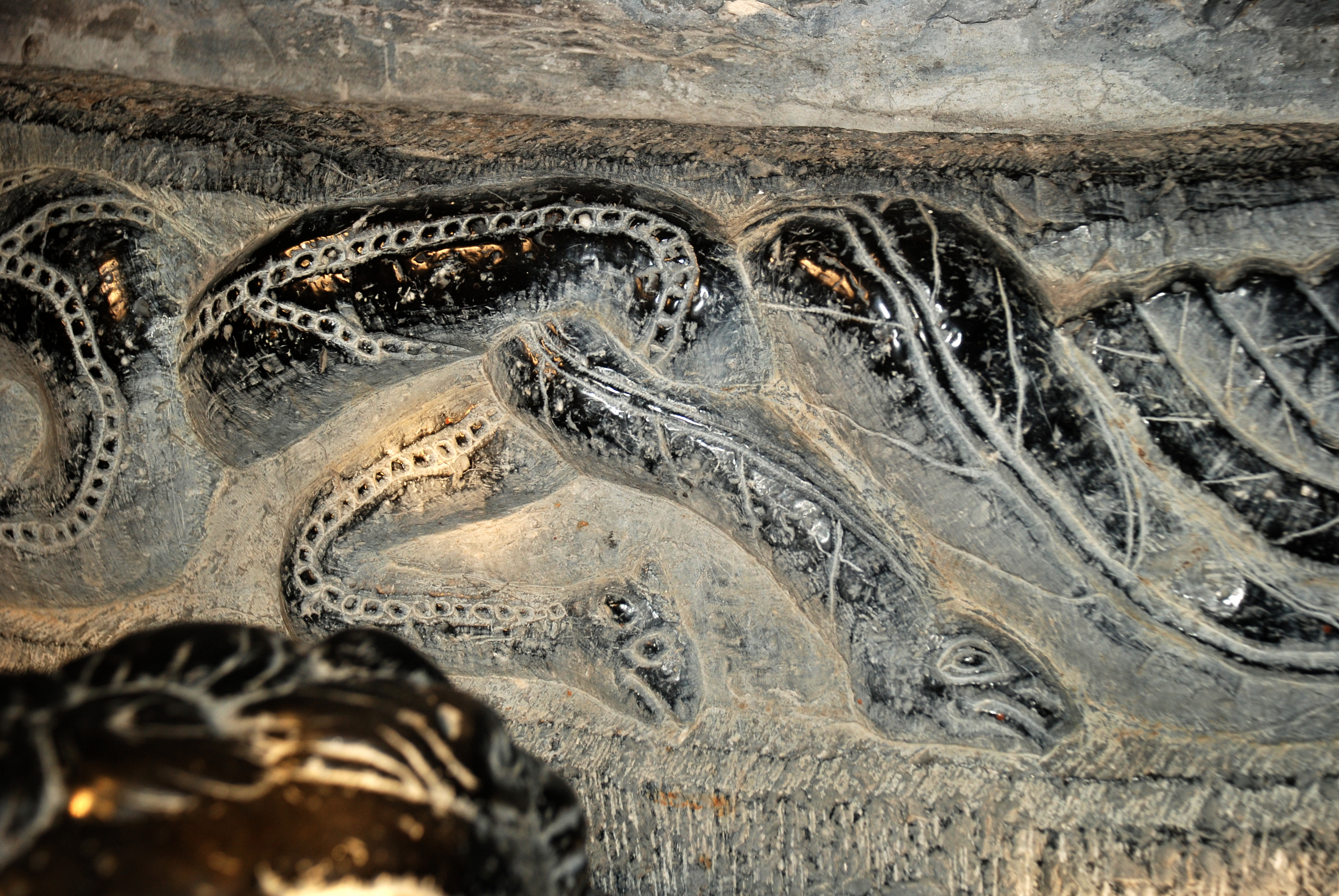 Belgique - Province de Namur - Fonts baptismaux de Furnaux - Dragon